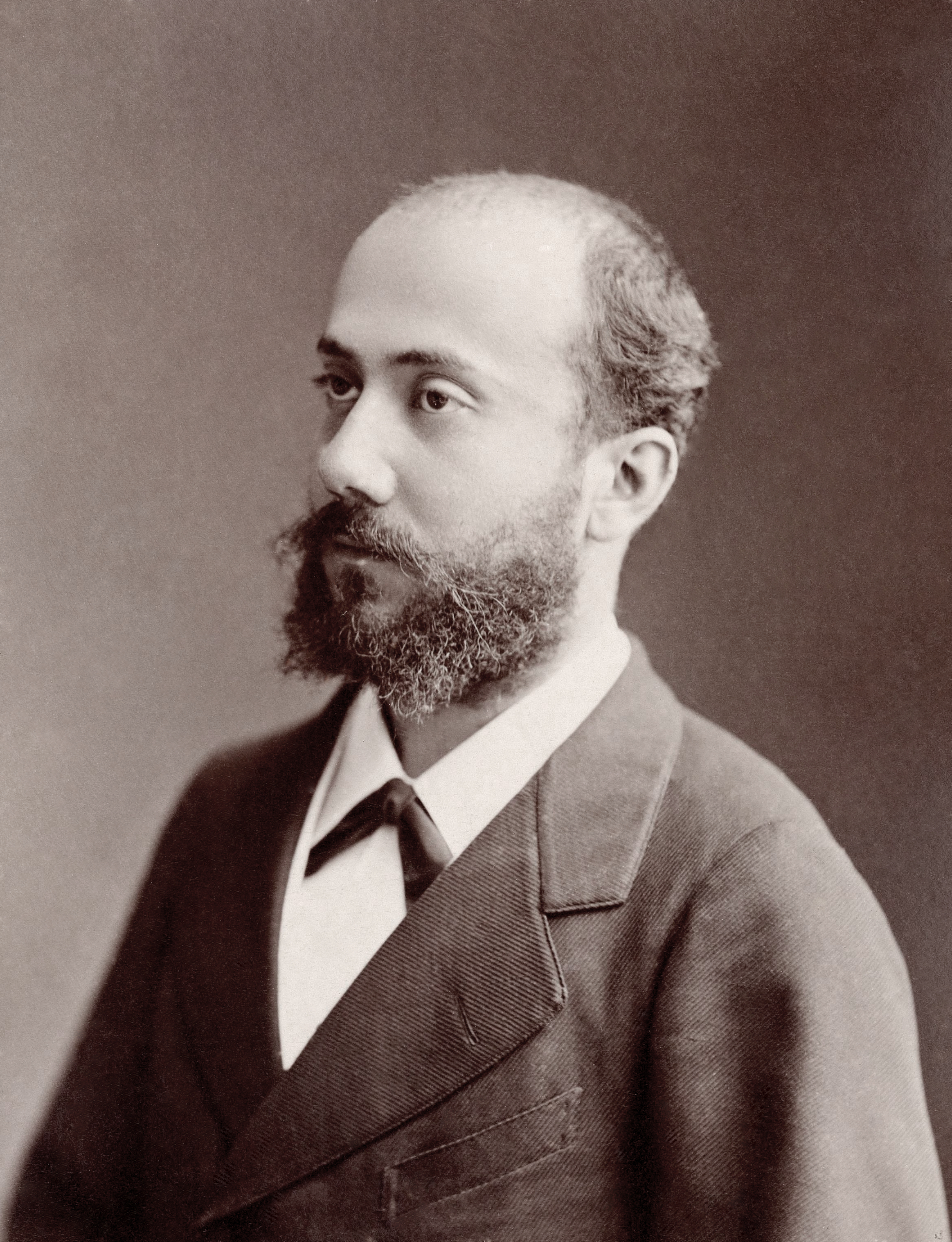 Alexandre Luigini (1850 - 1906) Compositeur, violoniste et chef d'orchestre français.